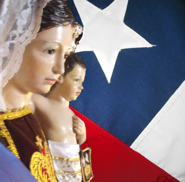 Imagen de la Virgen del Carmen que se encuentra en el Santuario del pueblo de La Tirana.